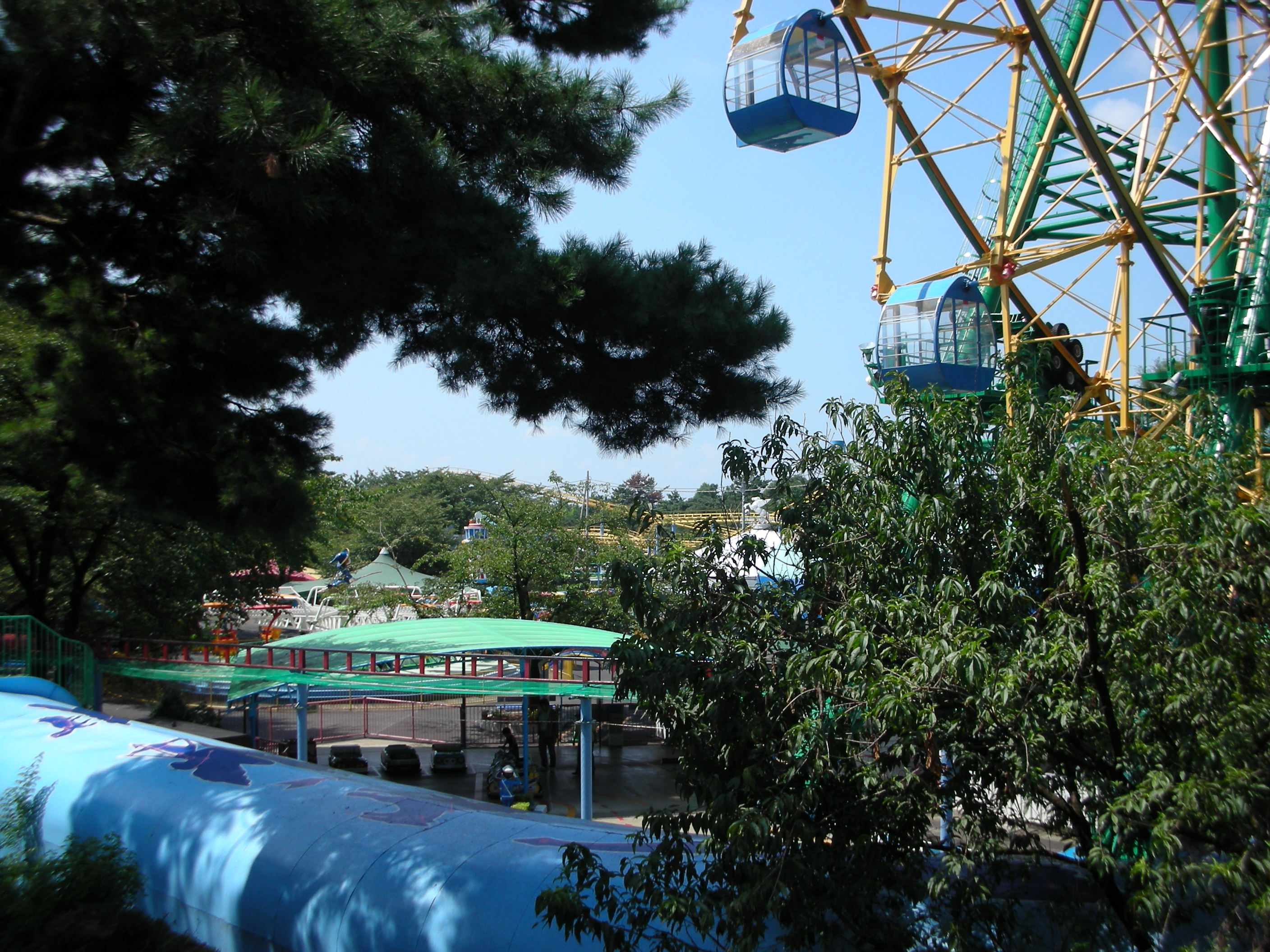 華蔵寺公園遊園地の外観